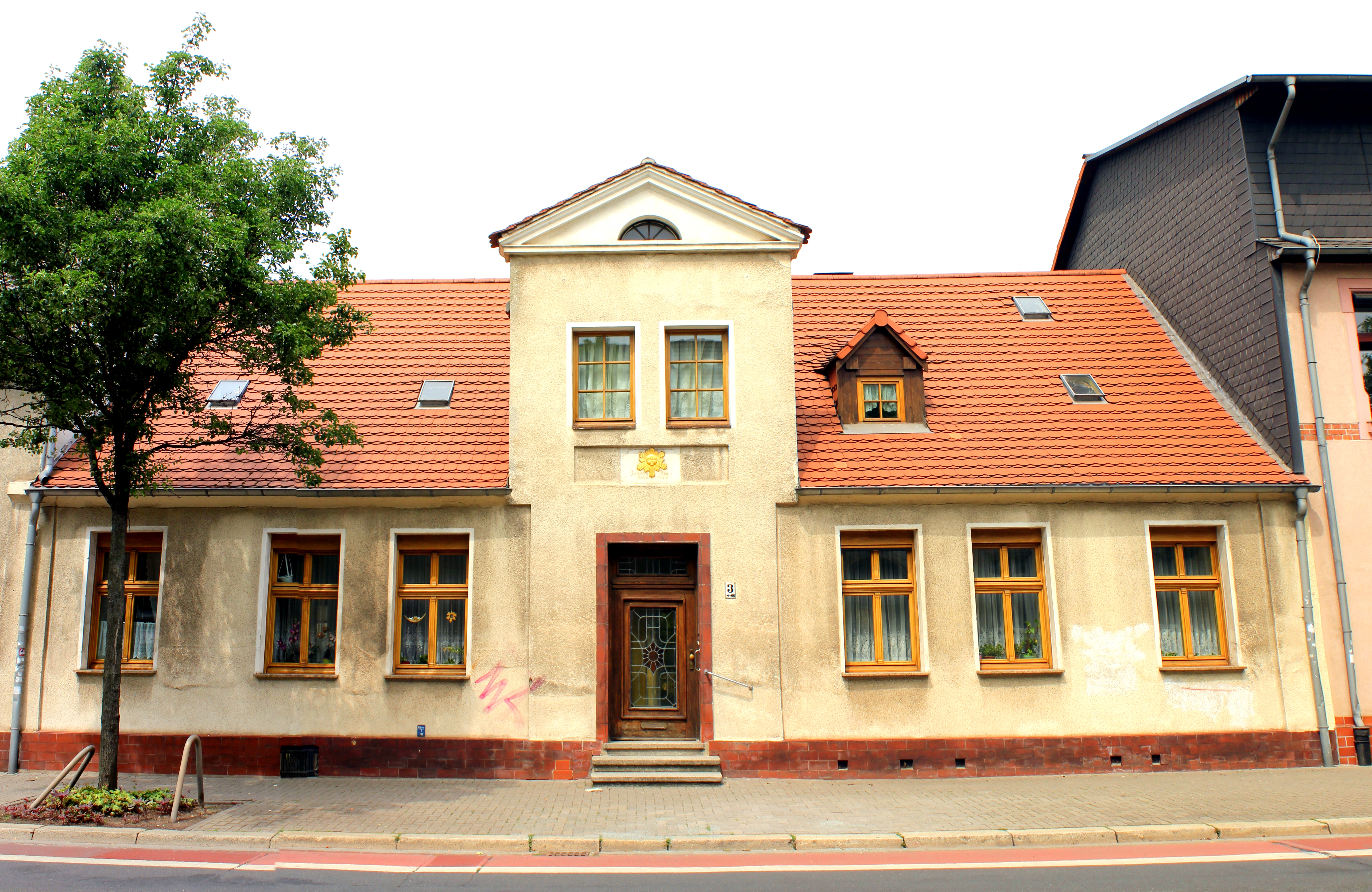 Wohnhaus, Mittagstraße 3, Magdeburg